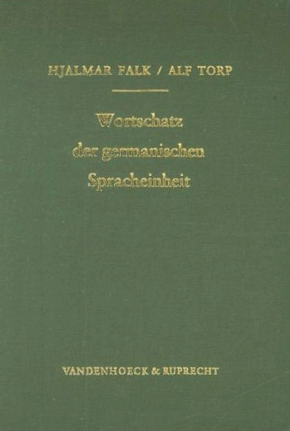 Hjalmar Falk, Alf Torp: Wortschatz der germanischen Spracheinheit. 5. Auflage, unveränderter Nachdruck der 4. Auflage von 1909, Vandenhoeck & Ruprecht, Göttingen 1979, ISBN 3525264054.